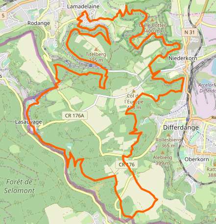 Streck vum Biergaarbechter-Pad